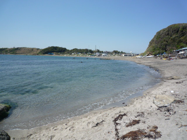 和田長浜海岸。